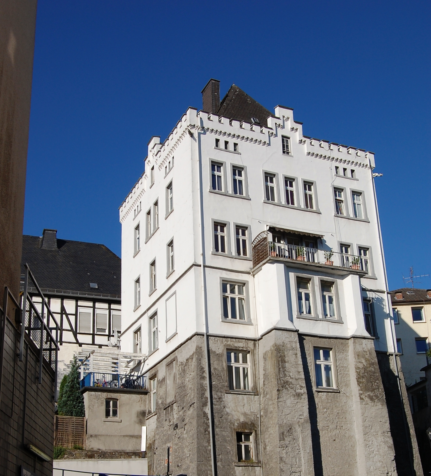 Haus Alter Markt 16, Groten-Turm, Arnsberg